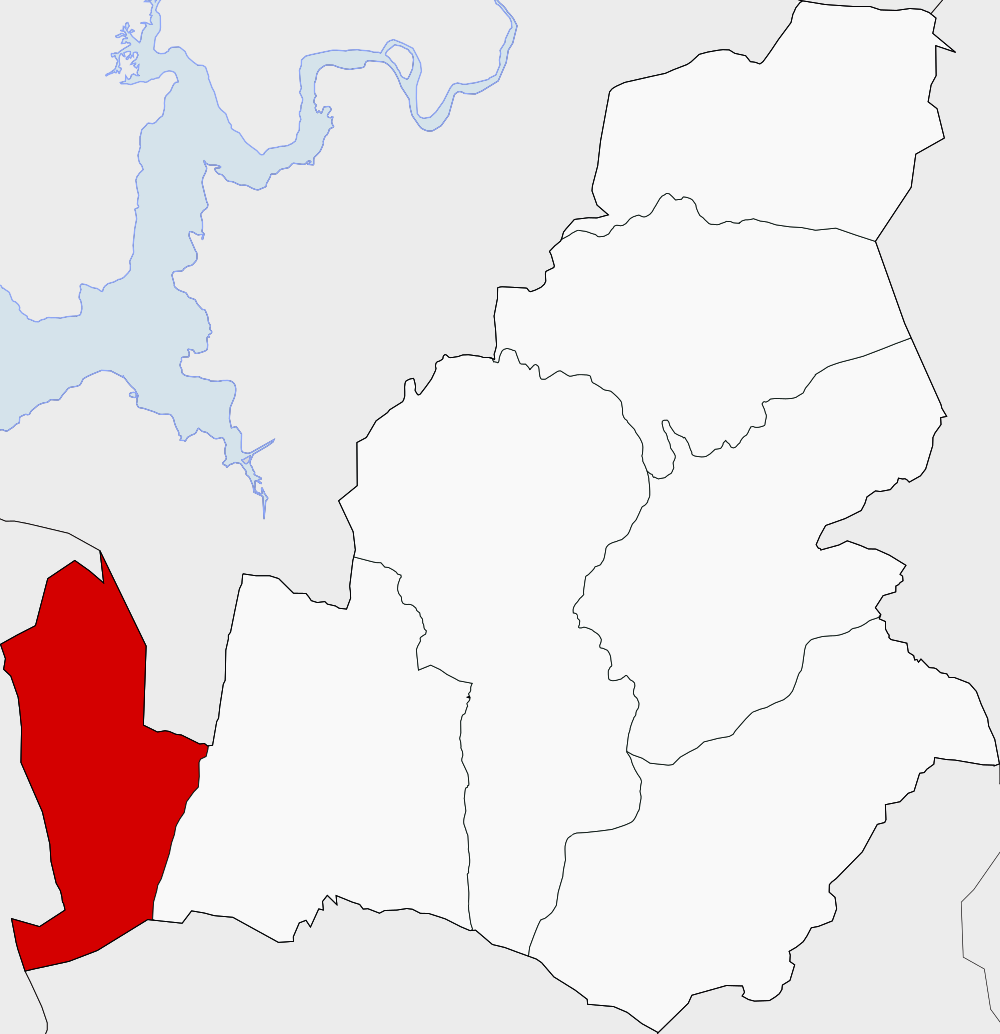 Extensión de la parroquia de Camboño en Lousame